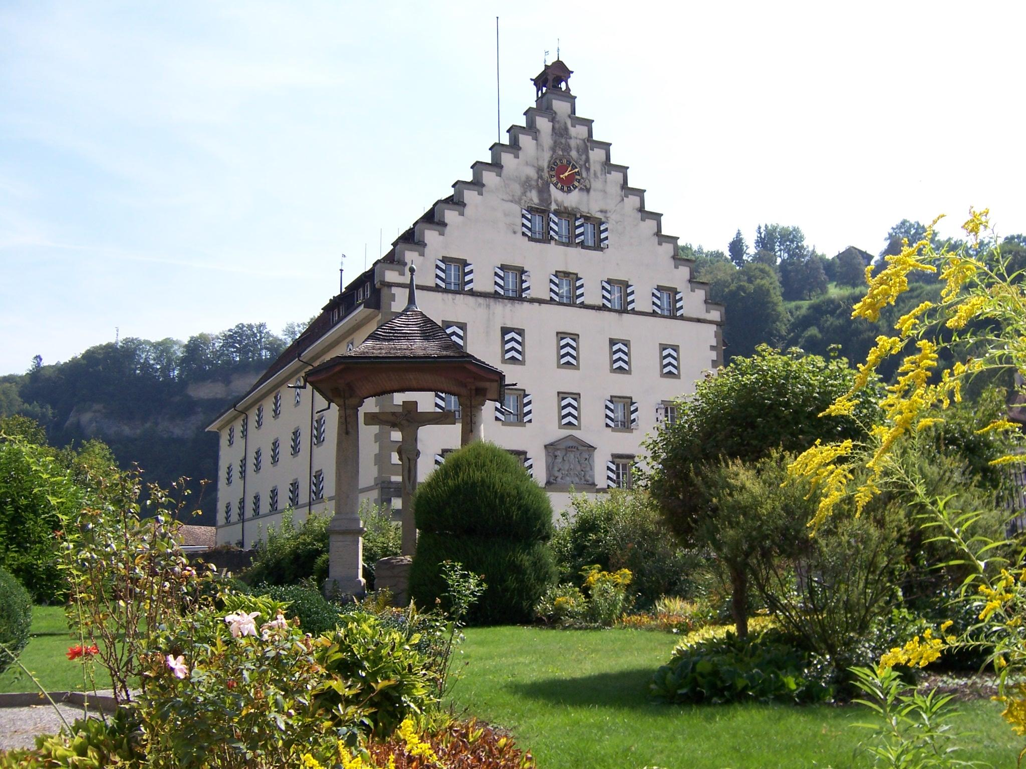 Mattenkaserne (Caserne de la Planche) vom Garten der Pfarrei St. Johann (Paroisse de St-Jean) in Freiburg im Üechtland (Fribourg; Kanton Freiburg / Fribourg, Schweiz) eigene Aufnahme vom 7. September 2006